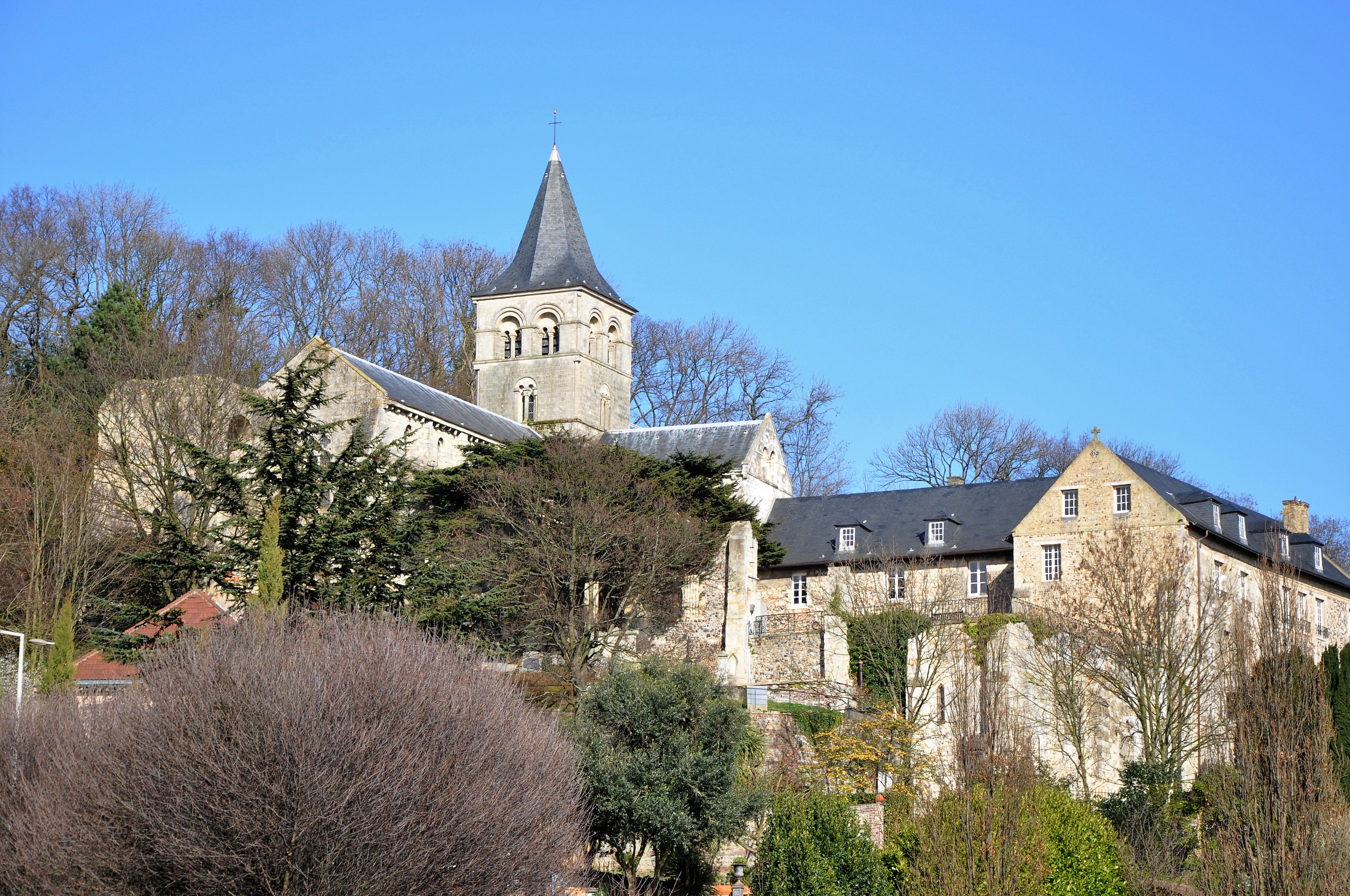 Abbaye de Graville au Havre